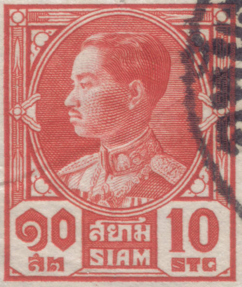 King Prajadhipok A stamp used in Rama VII's reign